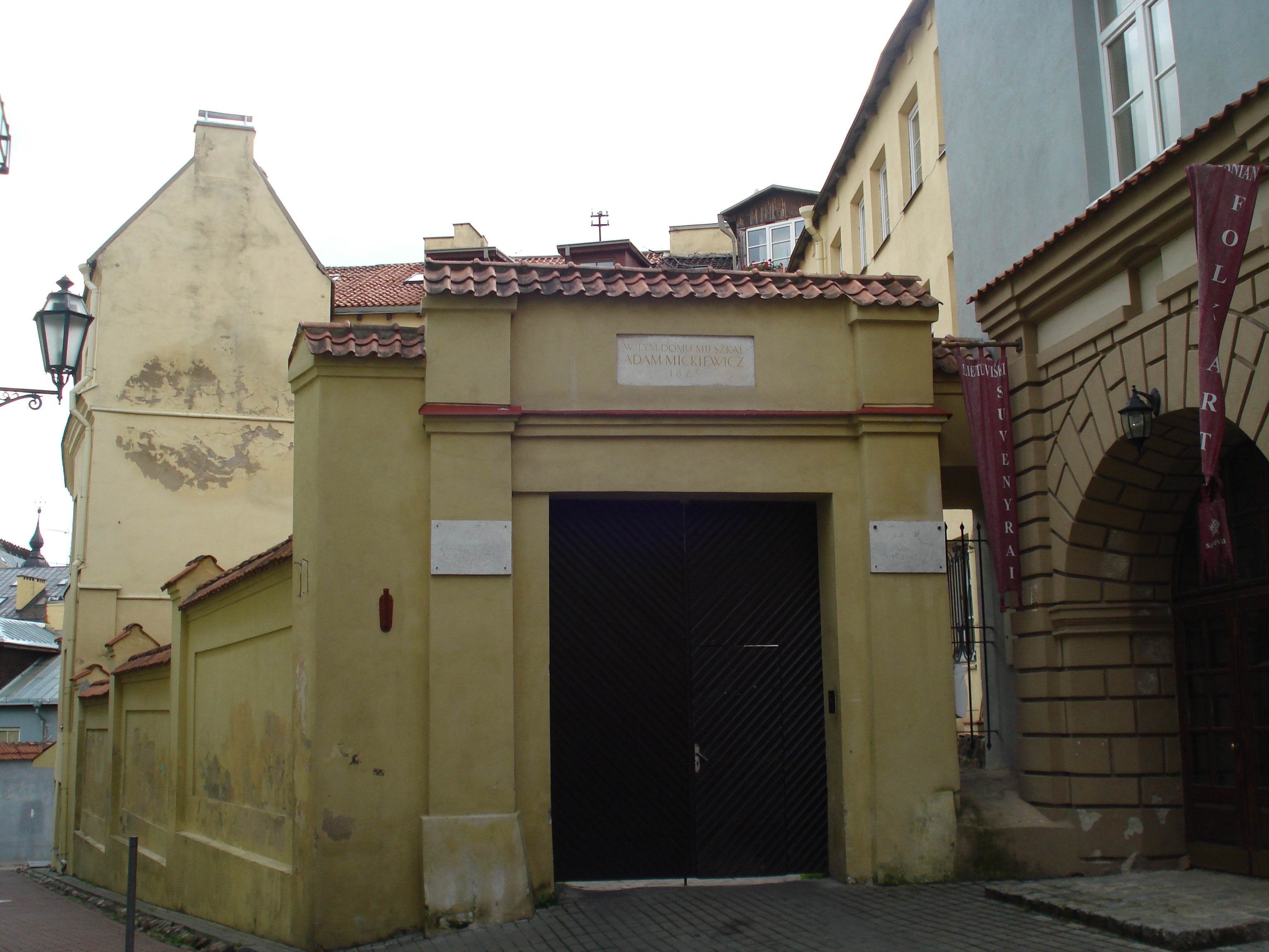 House in Vilnius (Literatu g., zaul. Literacki). Here lived Adam Mickiewicz